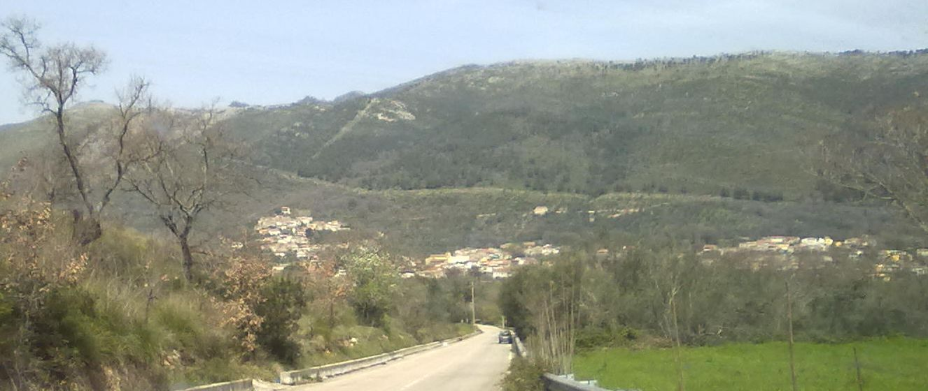 vista panoramica di Giano Vetusto(ce)